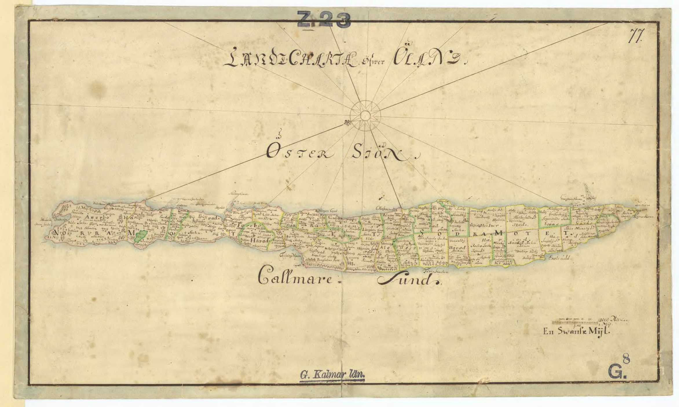 Gammal karta över Öland.